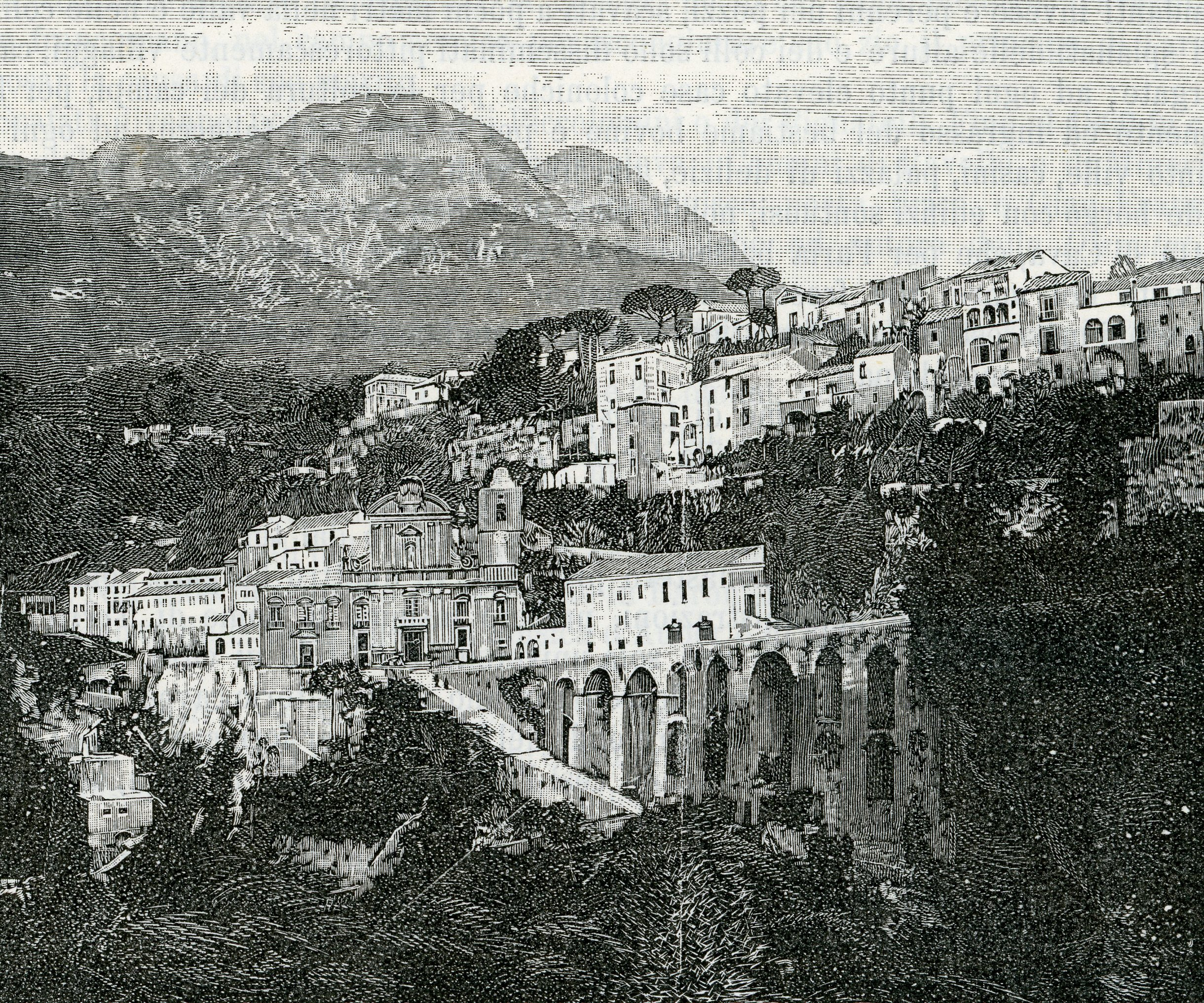 Cava dei Tirreni: veduta della badia di S. Trinità (xilografia di Brend'amour 1898).